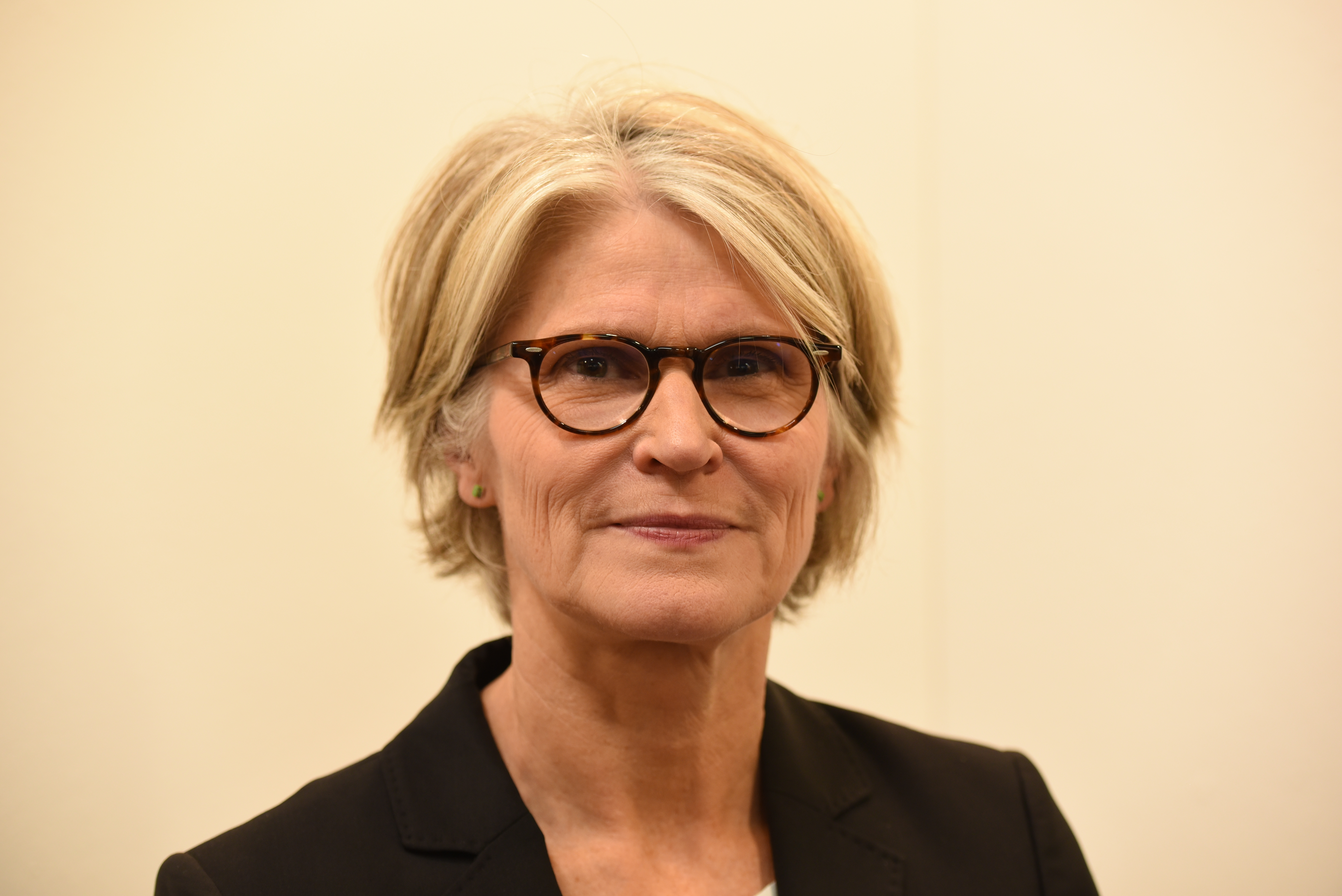 Professorn i litteraturvetenskap vid Uppsala universitet och ledamoten av Samfundet De Nio, Anna Williams på Bokmässan i Göteborg 2017.